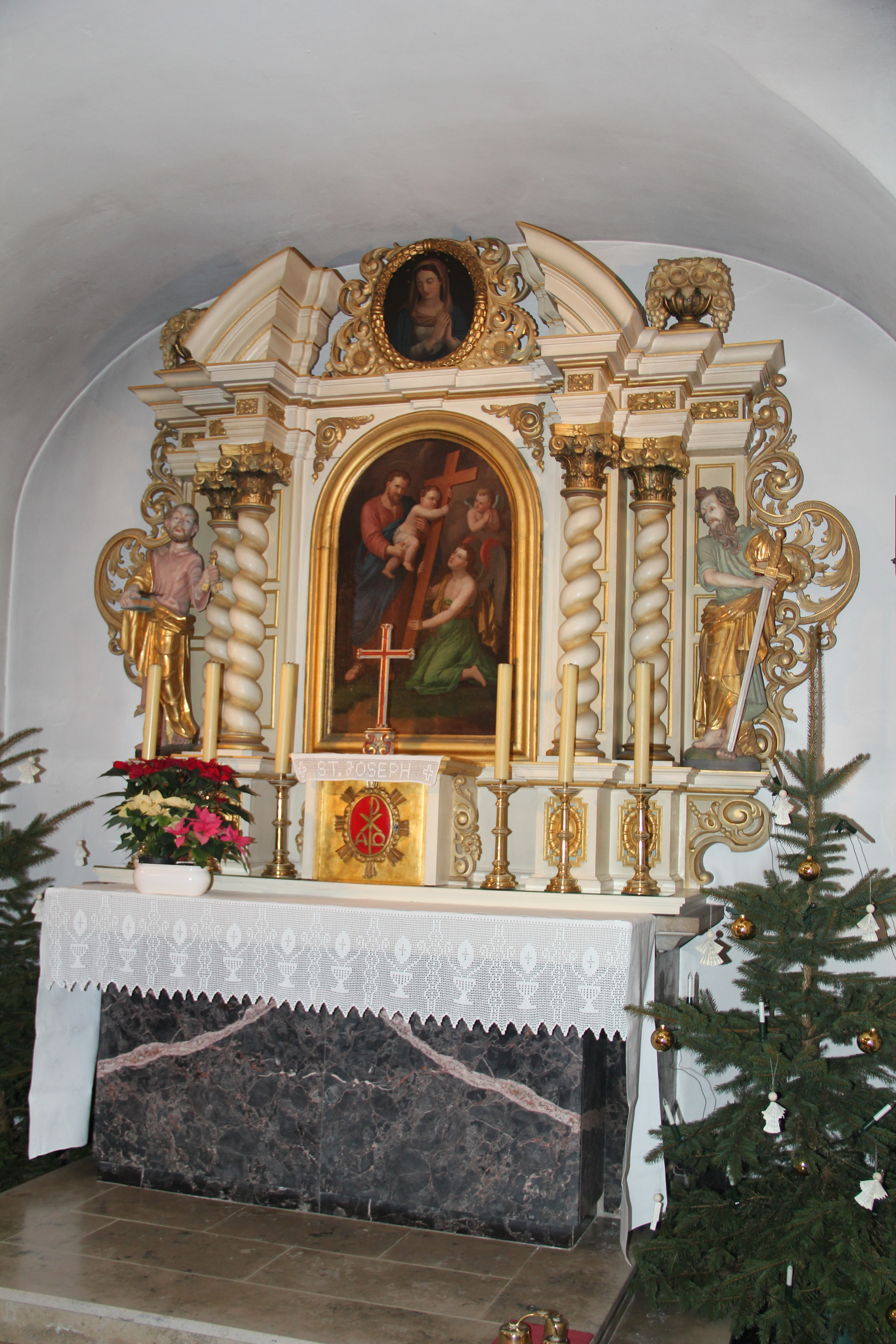 Hochaltar der Sankt-Josef-Kapelle in Beller